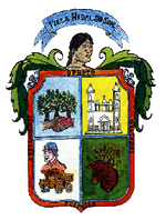 Escudo del municipio sonorense.